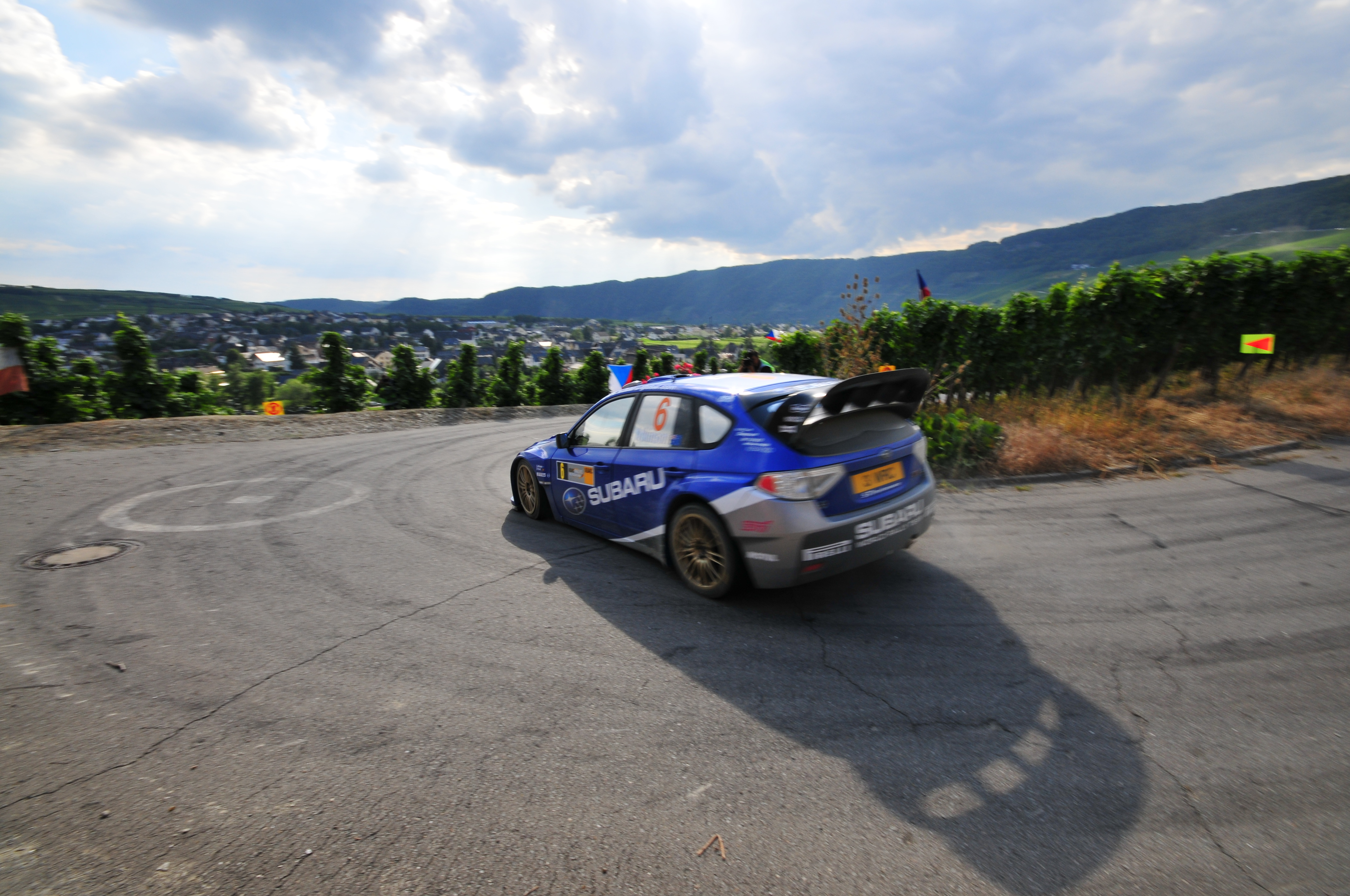 Chris Atkinson driving his Subaru Impreza WRC2008 at the 2008 Rallye Deutschland.